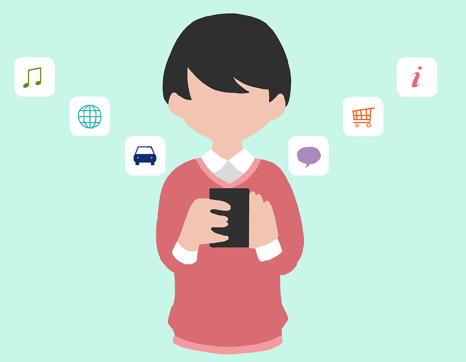 Disegno di un ragazzo con smartphone